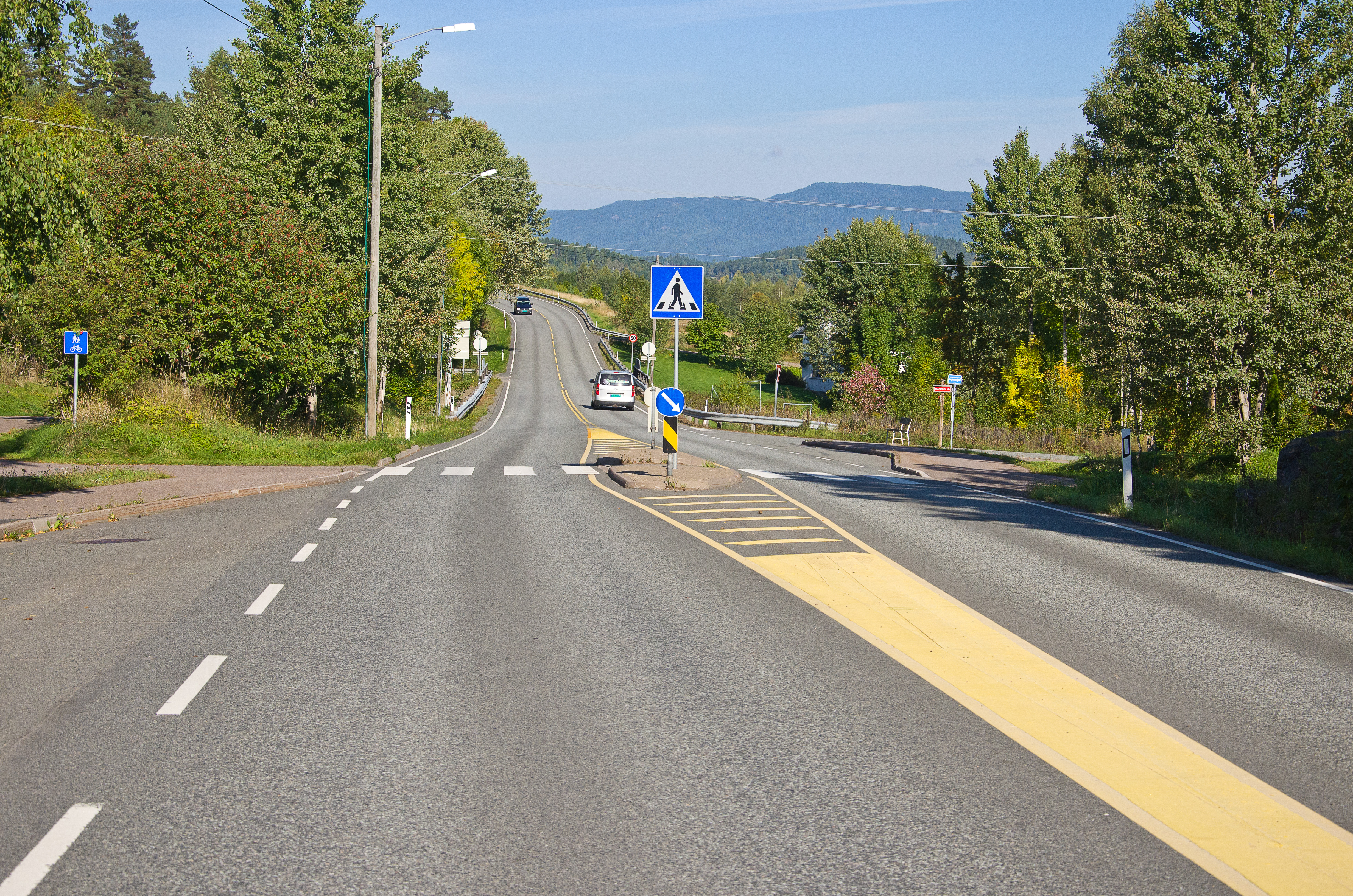 Fylkesvei 35 Hofveien ved Sundbyfoss